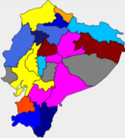 mapa elecciones seccionales ecuador 2019